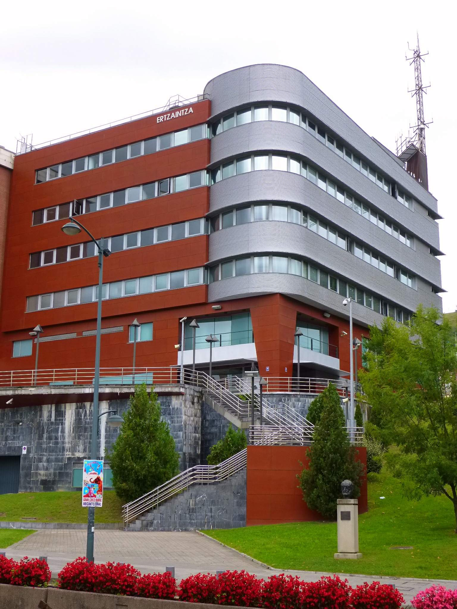 Cuartel de la Ertzaintza en Bilbao